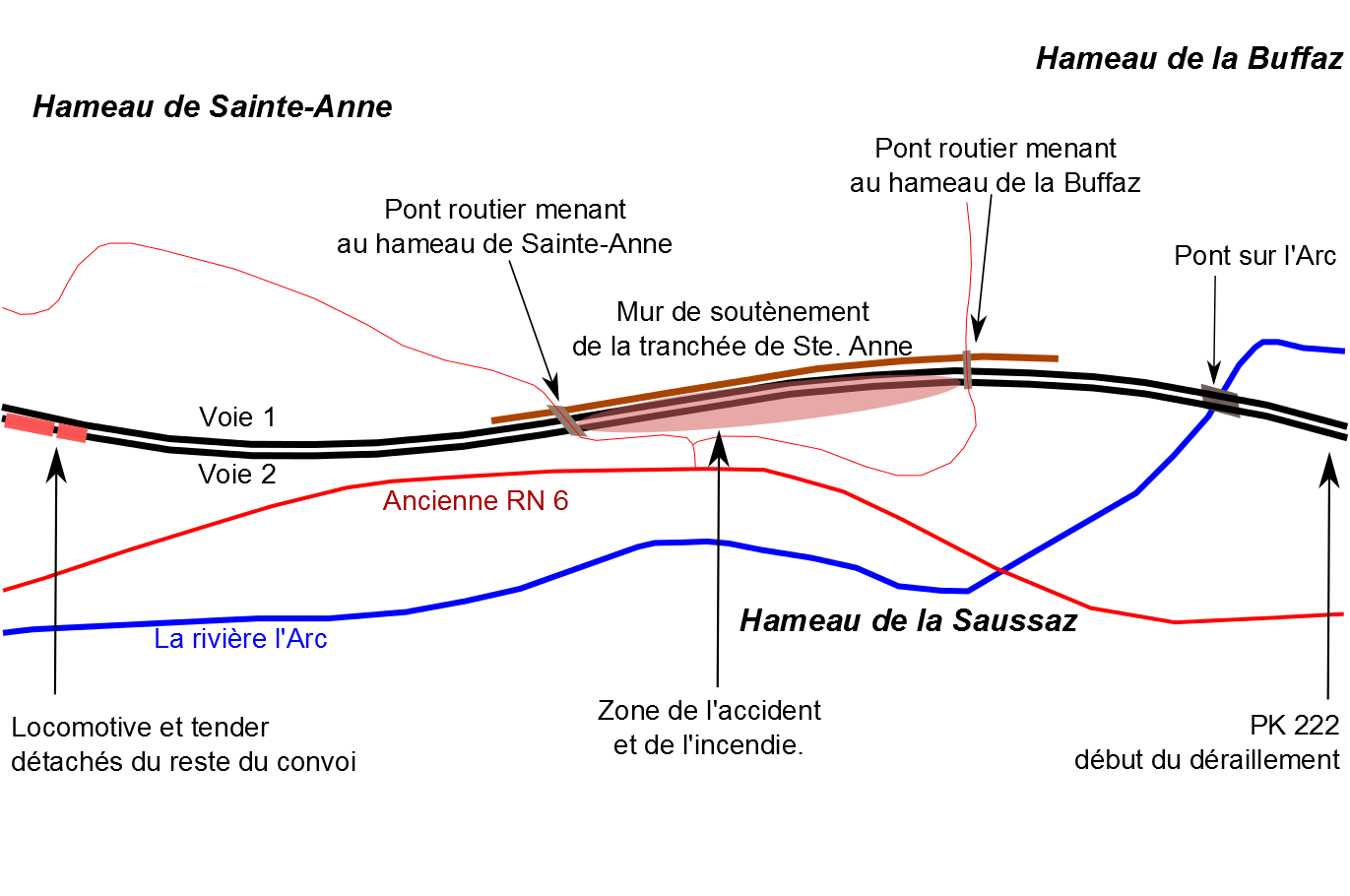 Croquis de l'accident ferroviaire de Saint-Michel-de-Maurienne du 12 décembre 1917 / Saint-Michel-de-Maurienne, Savoie, France